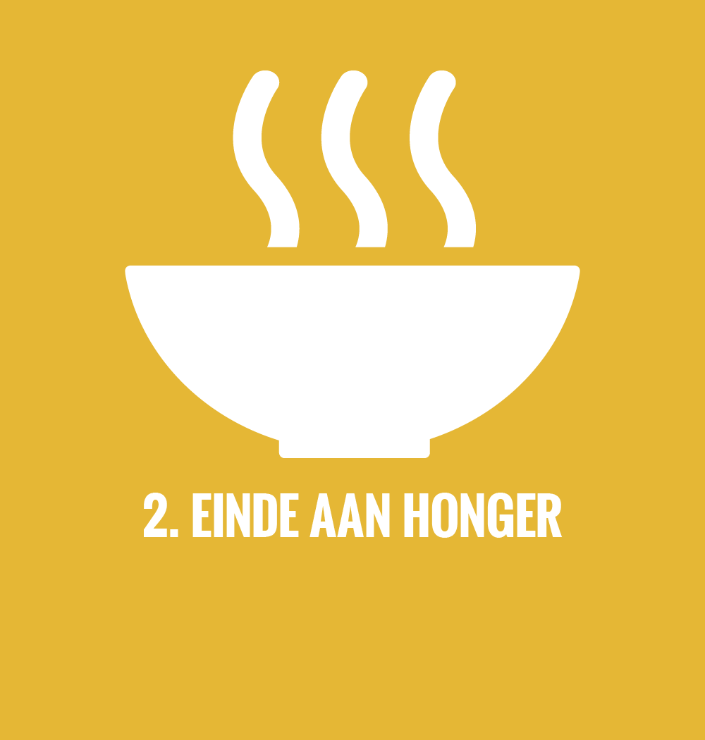 Duurzame ontwikkelingsdoel SDGRomână: Obiectivul de dezvoltare durabilă nr. 2: Fără foamete (în neerlandeză)